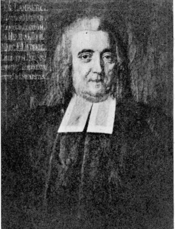 Erik Lamberg (1719–1780).